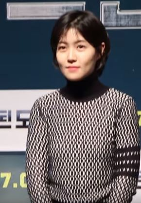 [TV10] 1월 9일 영화 '조작된 도시' 제작보고회 현장